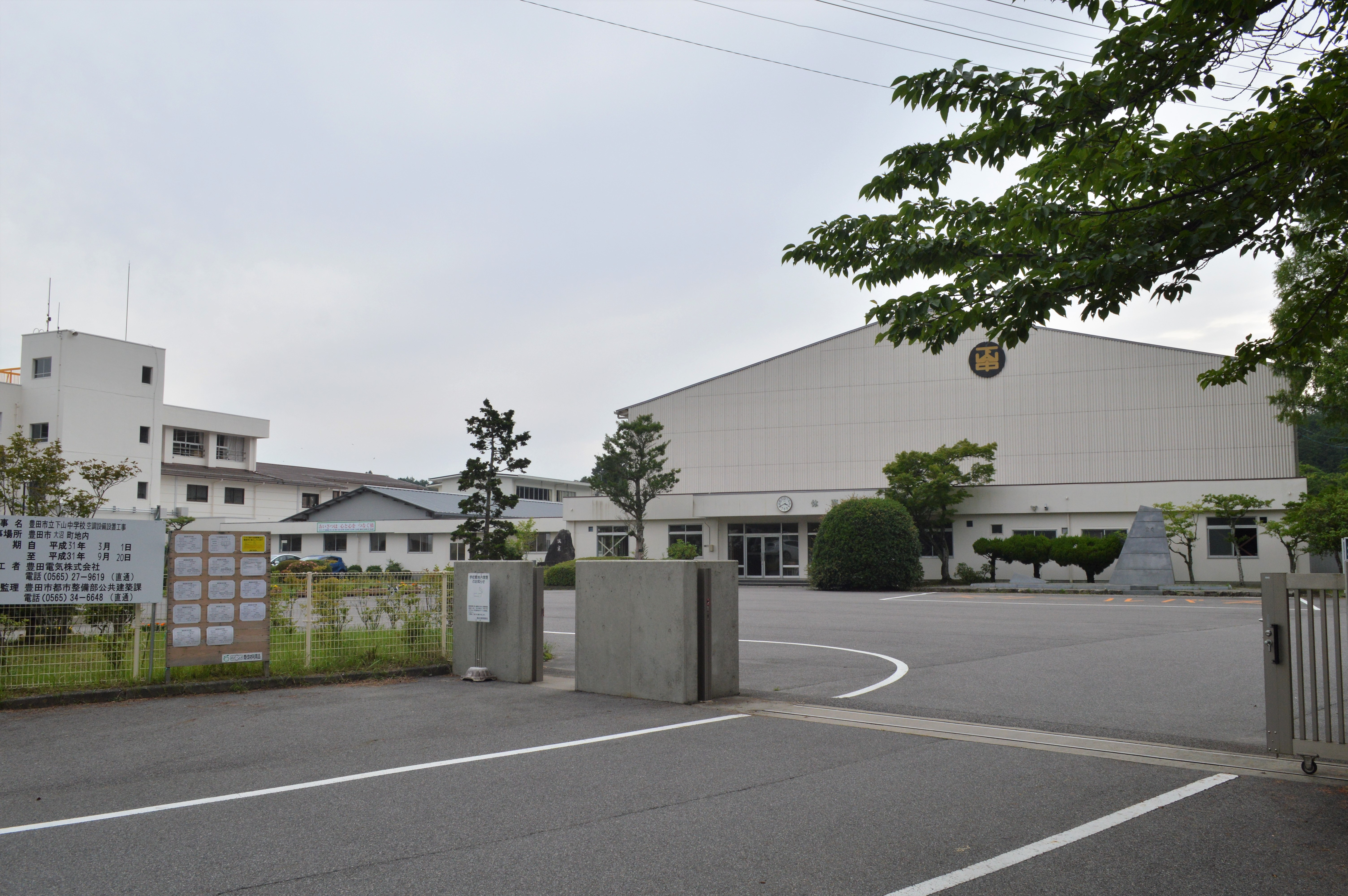 愛知県豊田市大沼町にある豊田市立下山中学校。